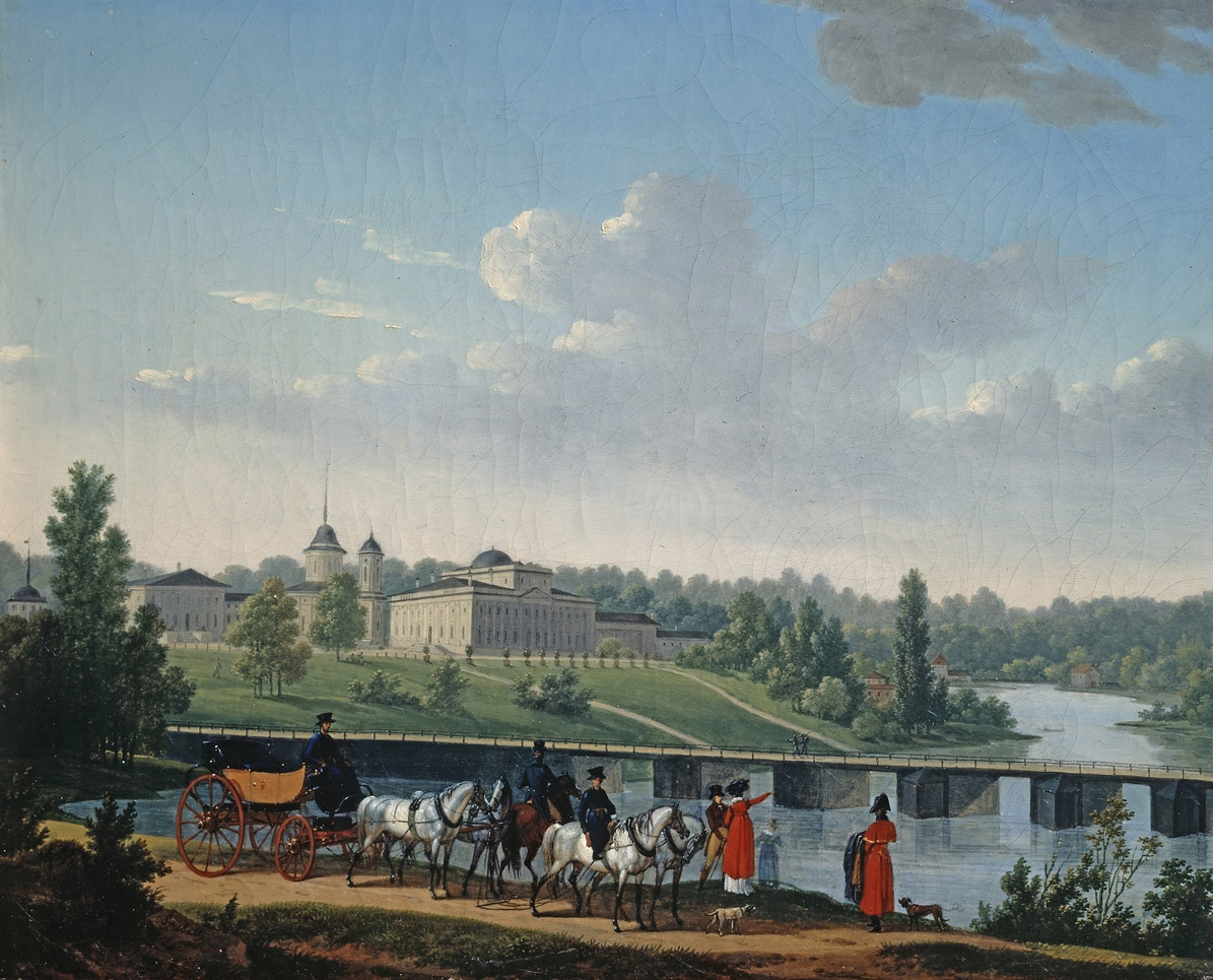 Храм Преображения Господня (Балашиха) Репродукция картины «Прогулка в парке».